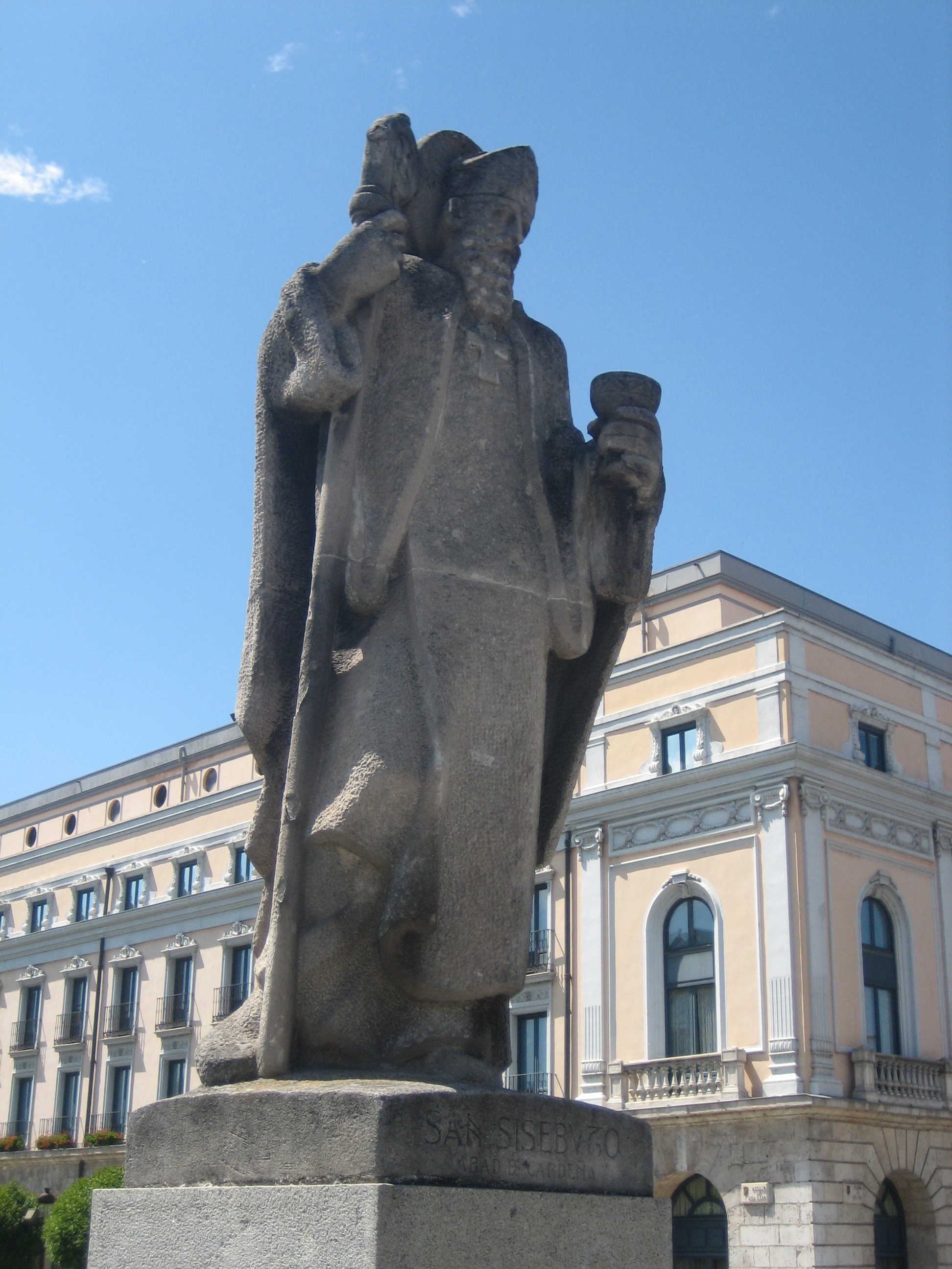 Estatua de San Sisebuto obra de Joaquín Lucarini